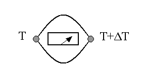 Schéma représentant la découverte de l'effet Seebeck. dessin réalisé par Utilisateur:David Berardan Utilisateur:David Berardan